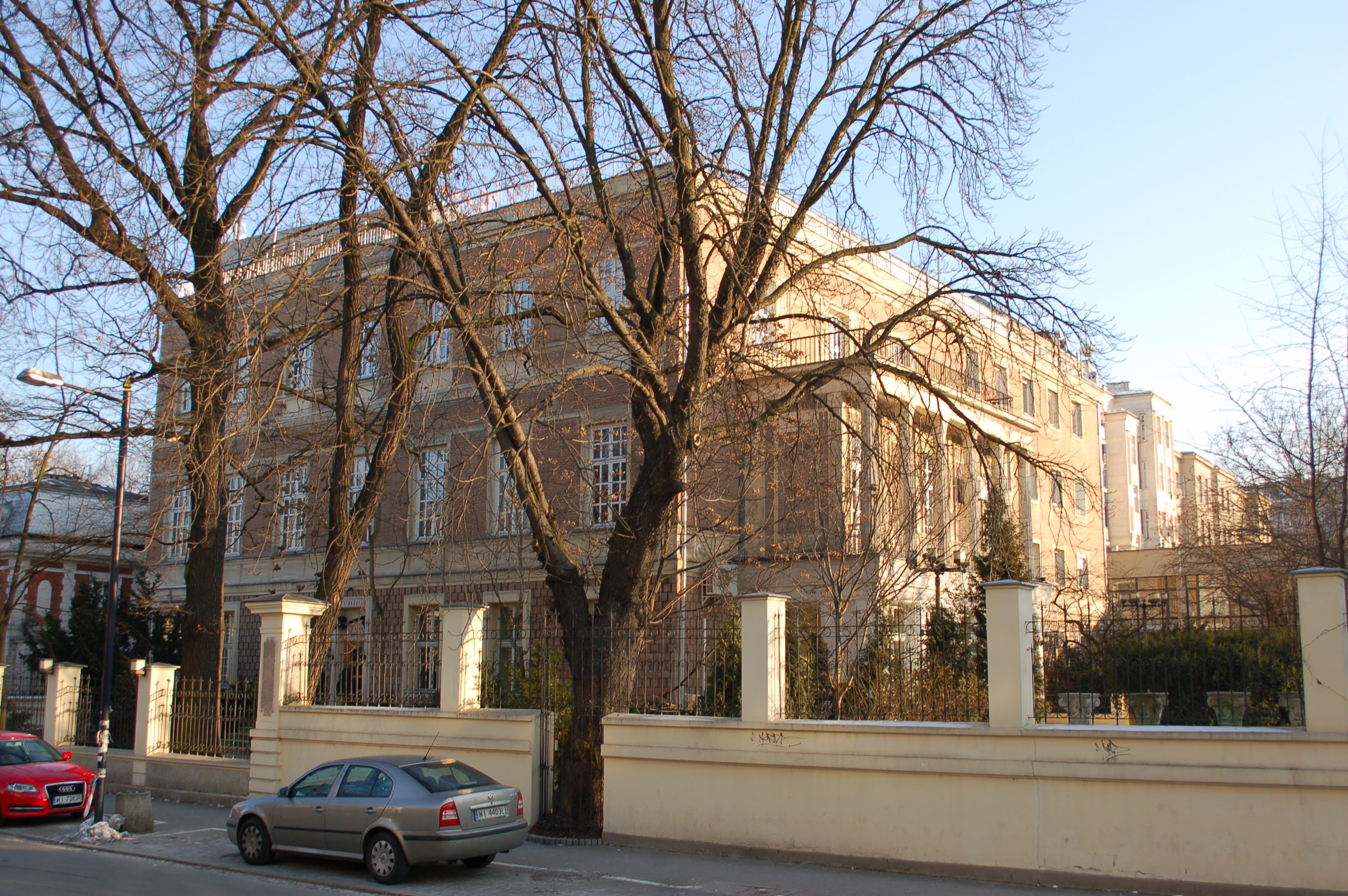 Foksal 3/5, Warsaw, Wołowski palace